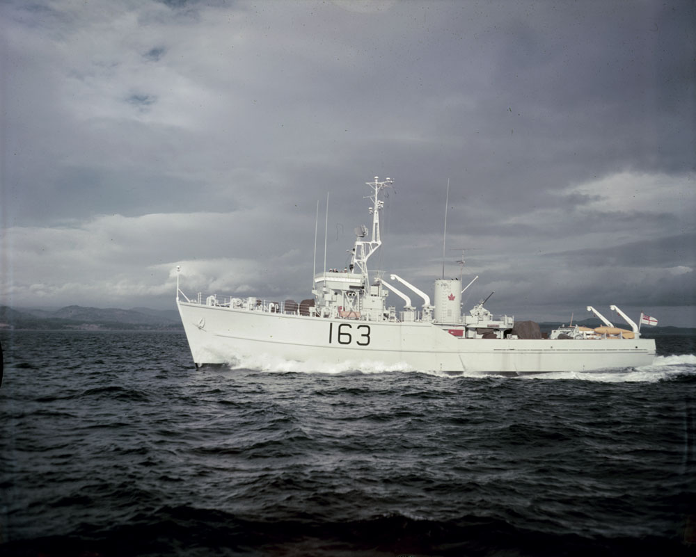 HMCS Miramichi (MCB 163)